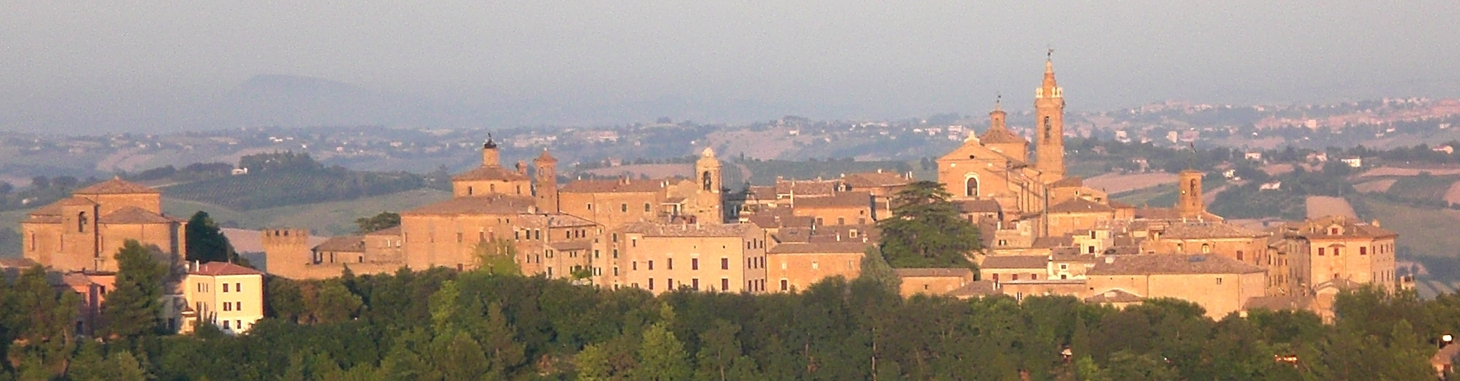 Skyline Corinaldo